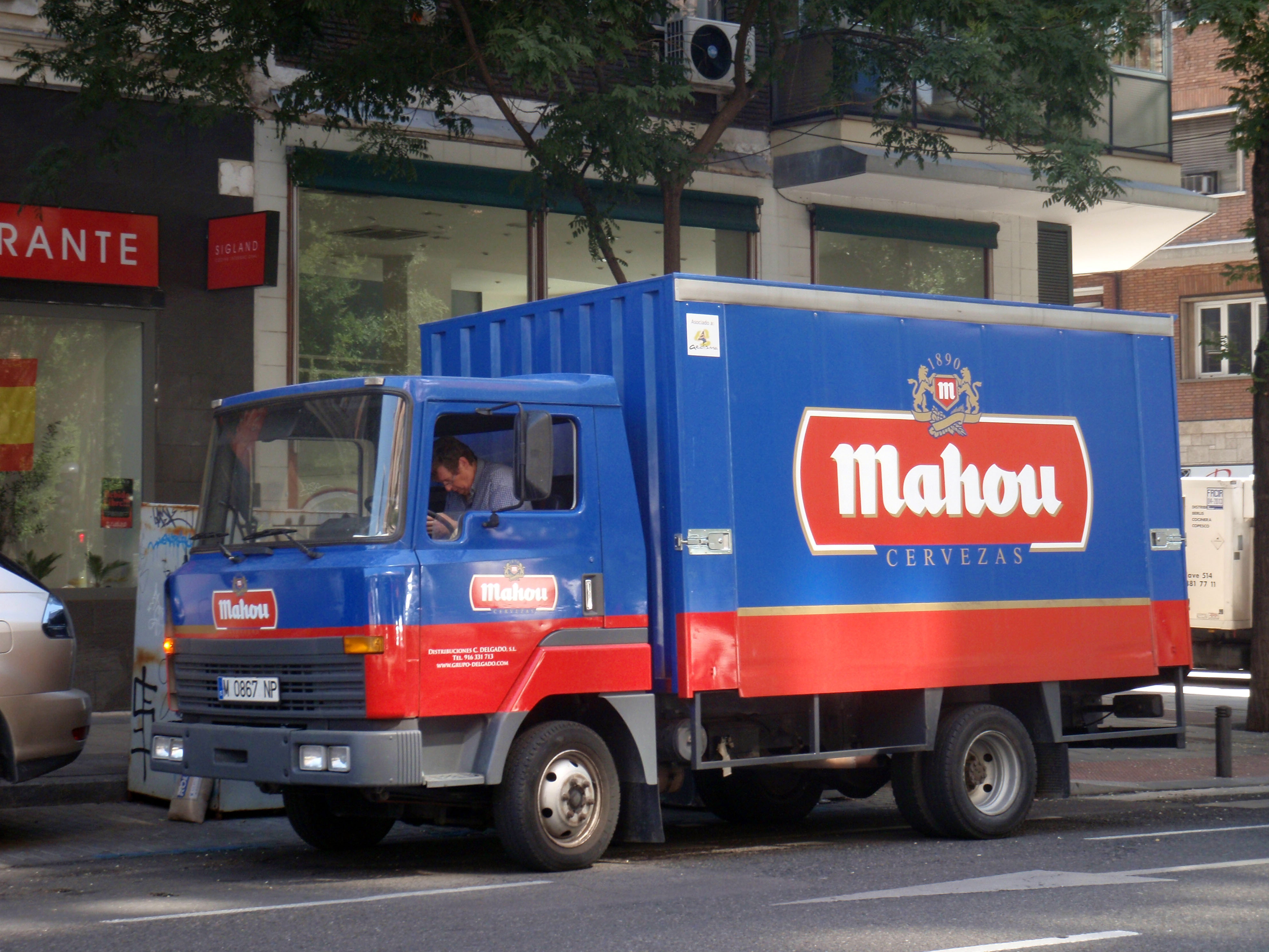 mahou